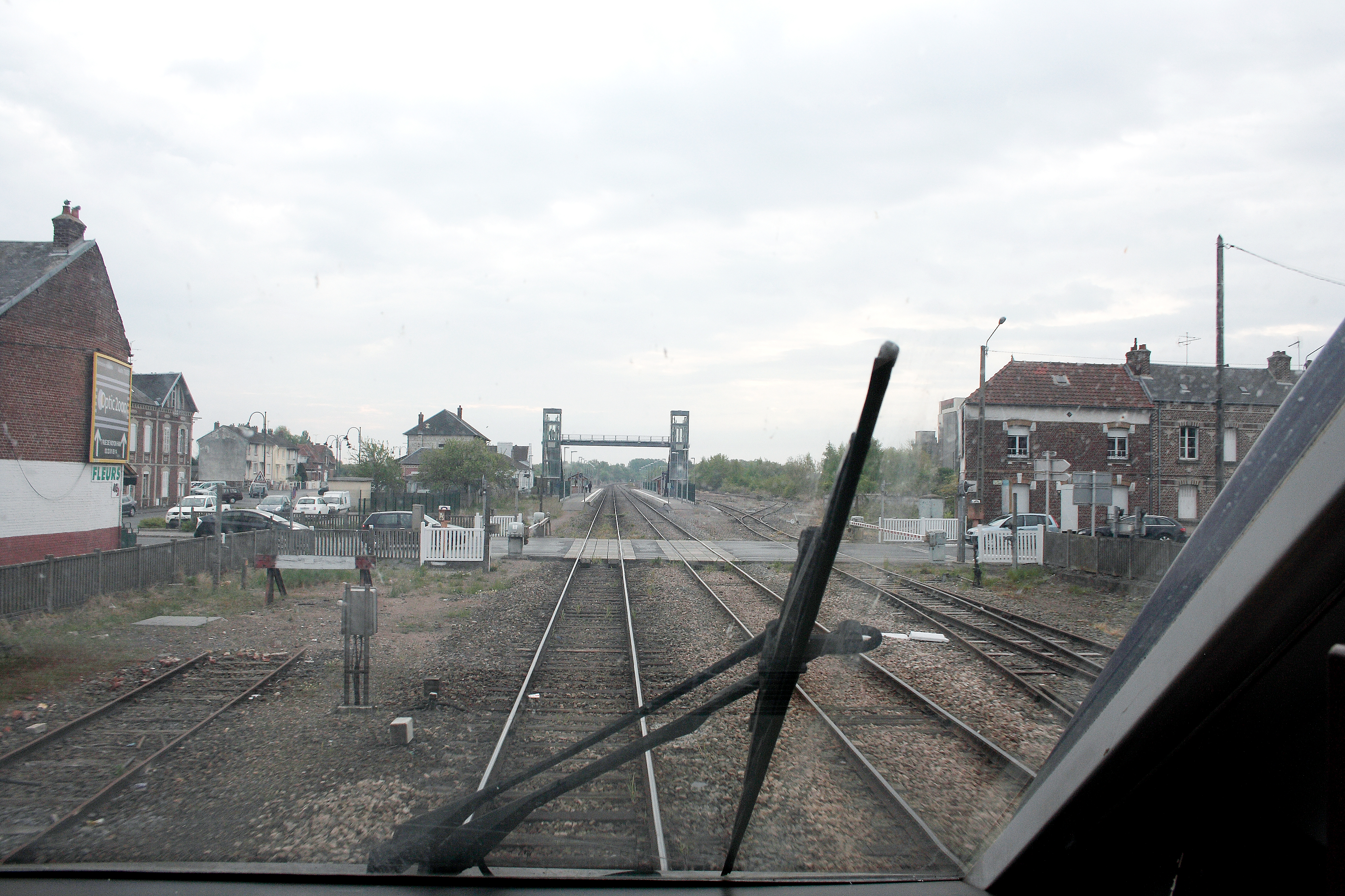 Vue sur les quais et la passerelle, ainsi que sur le passage à niveau voisin de la gare.